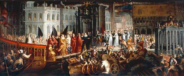 Lo sbarco a San Marco della dogaressa Morosina Morosini Grimani, 4 maggio 1597.label QS:Lit,"Lo sbarco a San Marco della dogaressa Morosina Morosini Grimani, 4 maggio 1597."